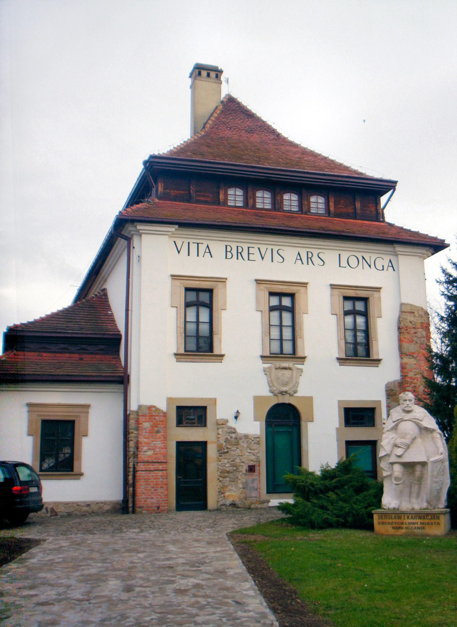 Gorlice, ul. Wróblewskiego 10A - dwór Karwacjanów, obecnie galeria sztuki (zabytek nr A-538/73)